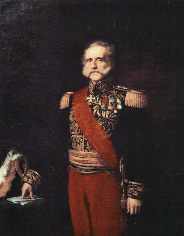 Retrato de Tomas Cipriano de Mosquera